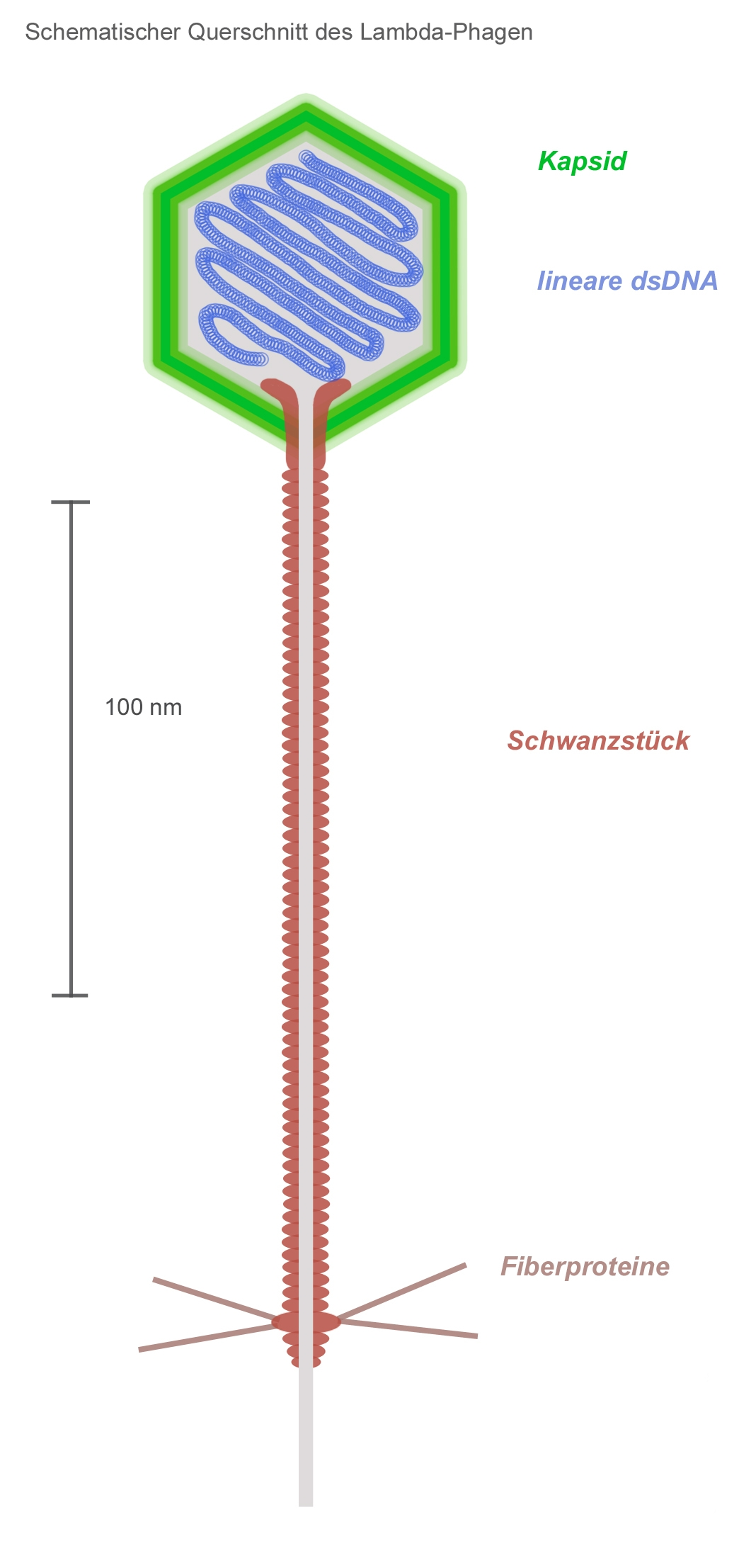 Schematischer Querschnitt durch einen Lambda-Phagen (Virusfamilie Siphoviridae)